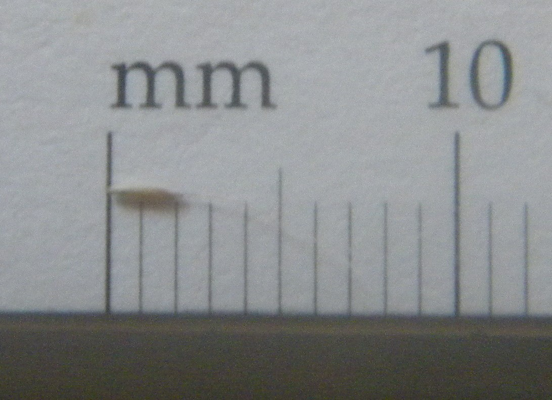 grajno de Apera spica-venti